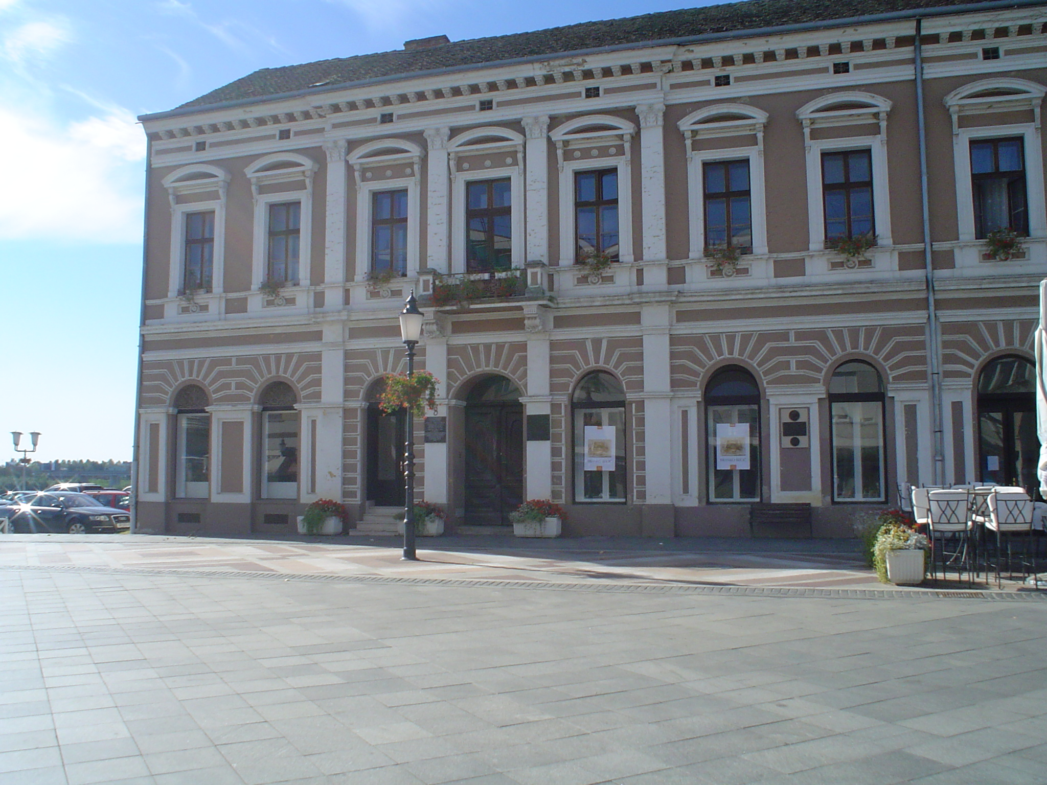 Kuća u kojoj je živjela i radila hrvatska spisateljica Ivana Brlić Mažuranić u Slavonskom Brodu.